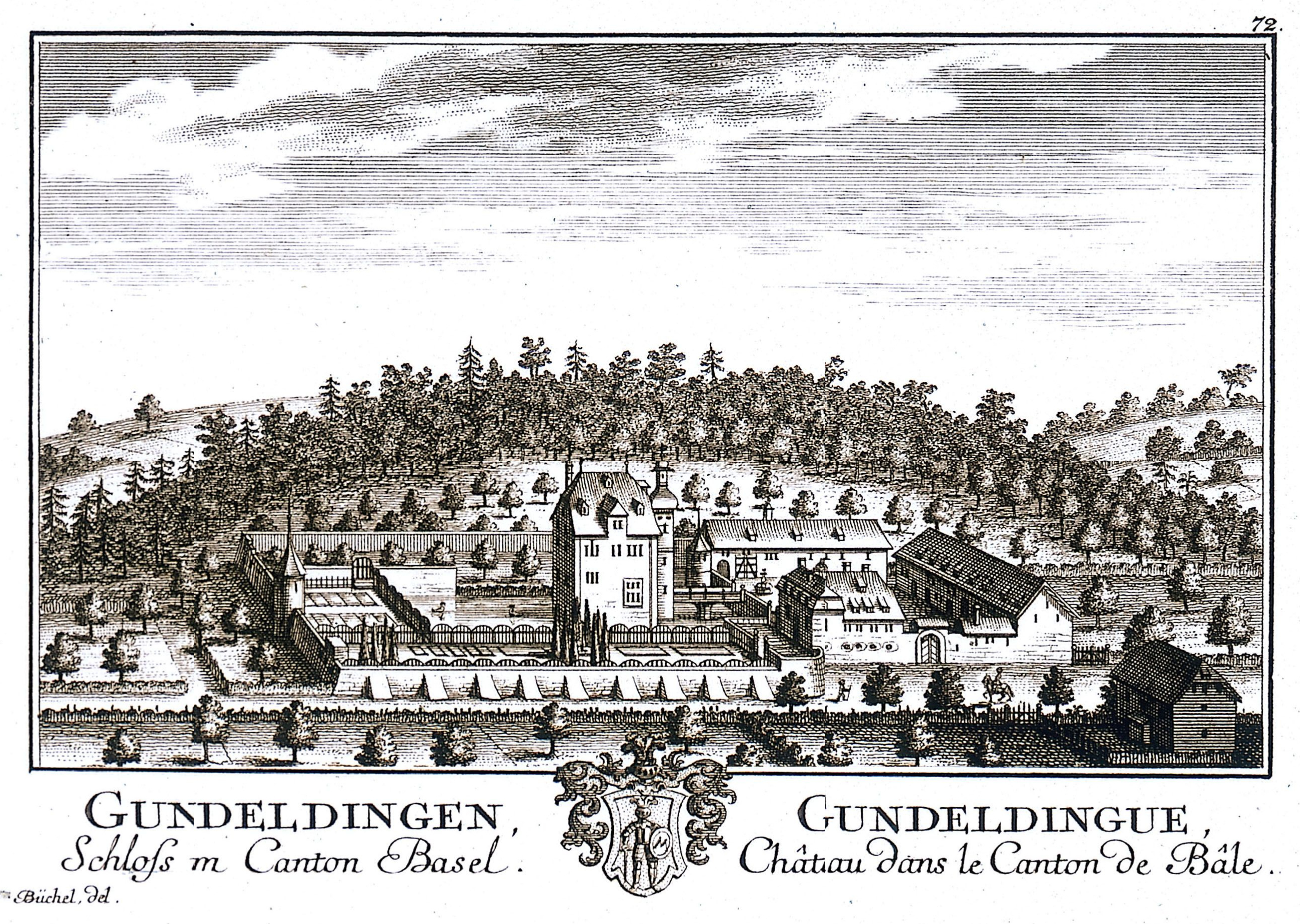 Basel, Schloss Unteres mittleres Gundeldingen, Vedute aus "Neue und vollständige Topographie der Eydgnossschaft ...", von David Herrliberger, Band 1, Zürich, 1754, Nr. 72, Kupferdruck, 9x14 cm